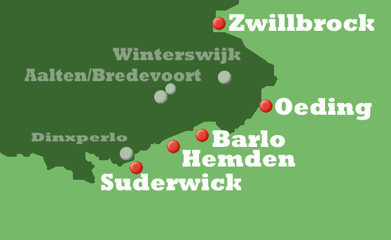 Missieposten langs de grens Duitsland-Nederland tijdens de reformatie in Oost Gelderland